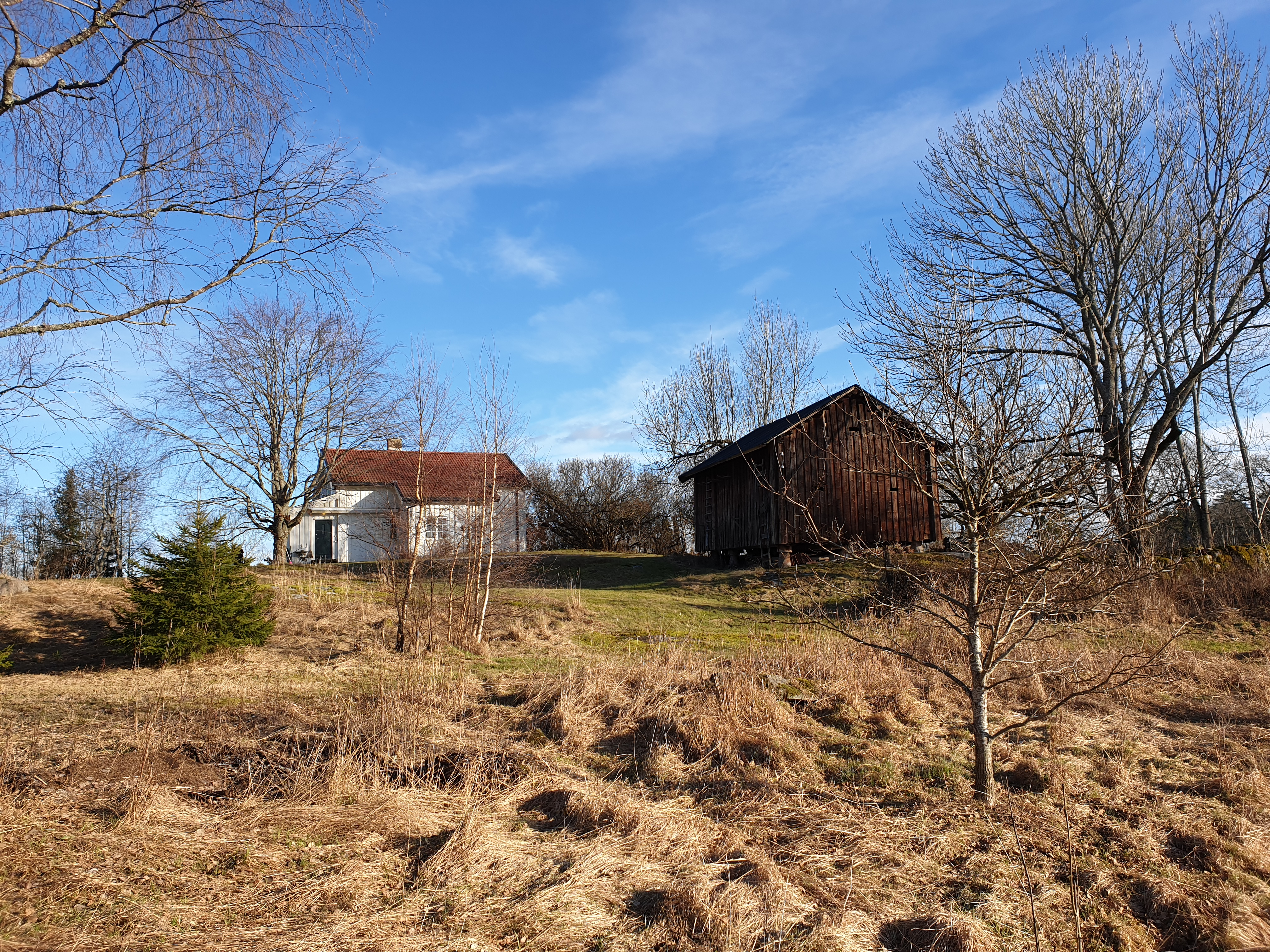 Gården Vestre Oppegård i Nordre Follo kommune.